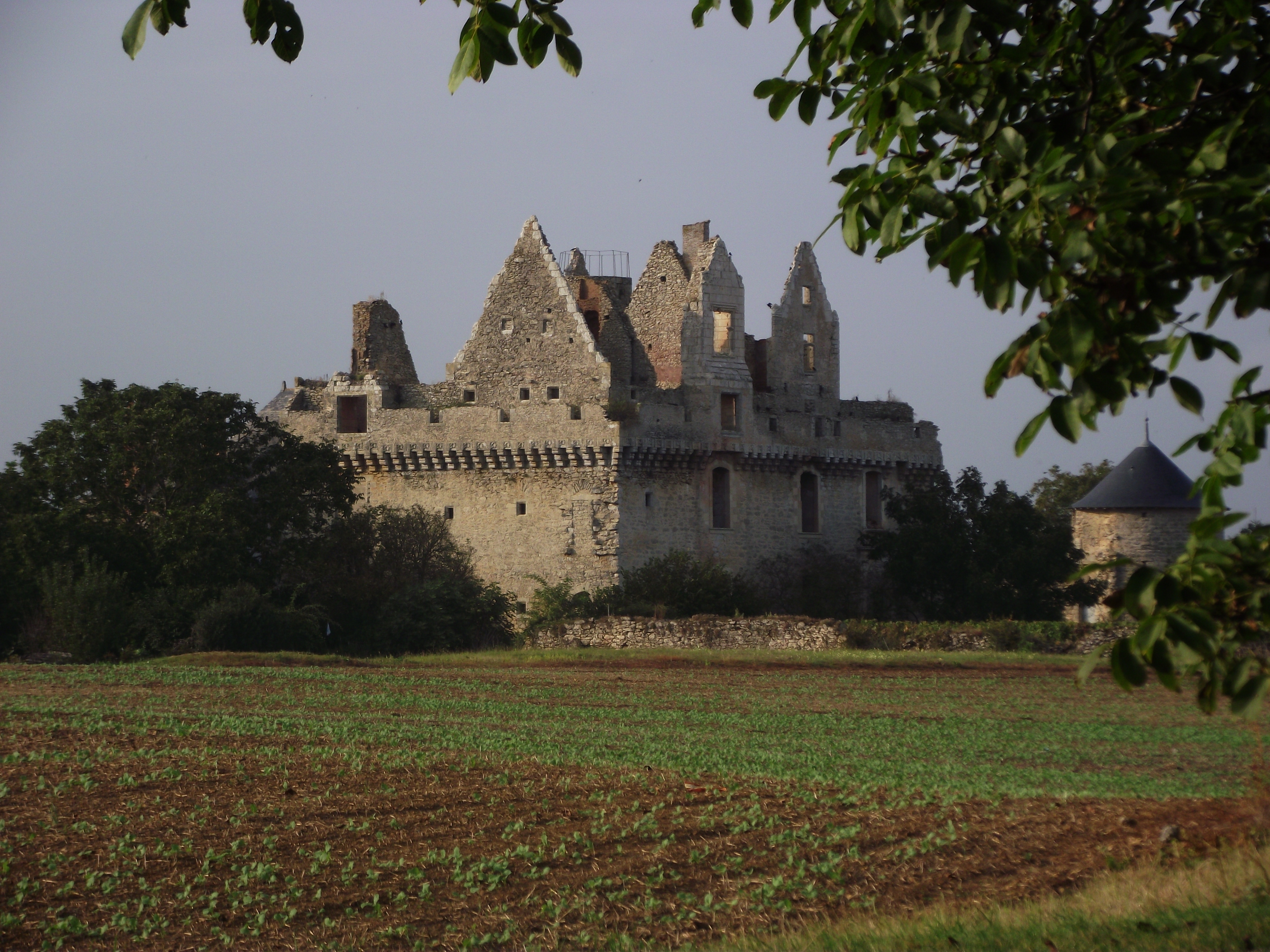 Château du Grand-Riou à Tigné (Maine-et-Loire, France).